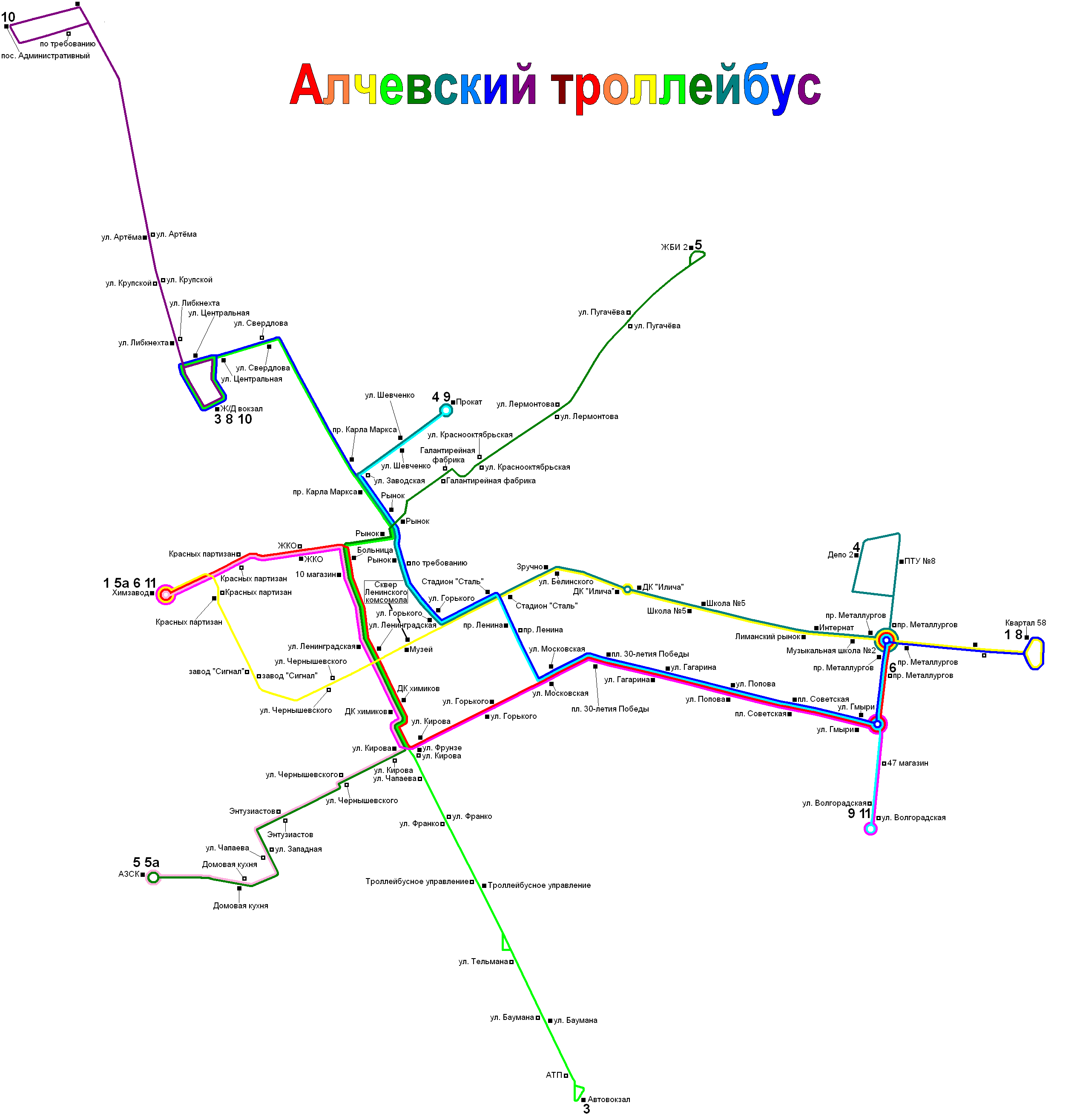 Схема тролейбусних маршрутів Алчевська